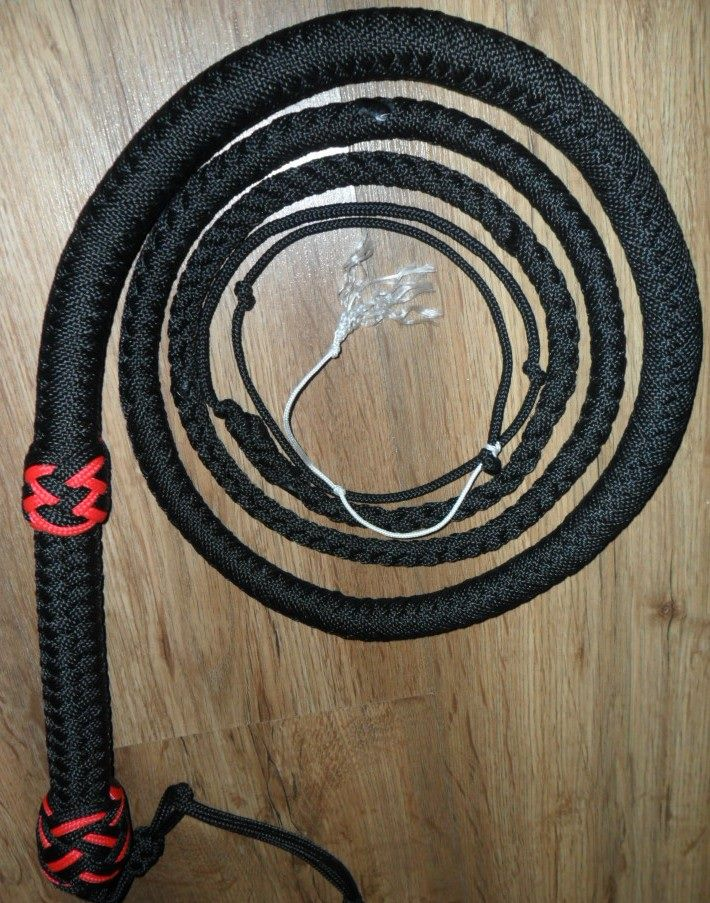 Bullwhip